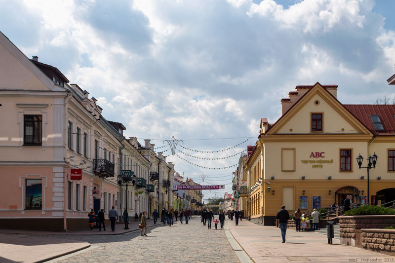 Гродна. Савецкая